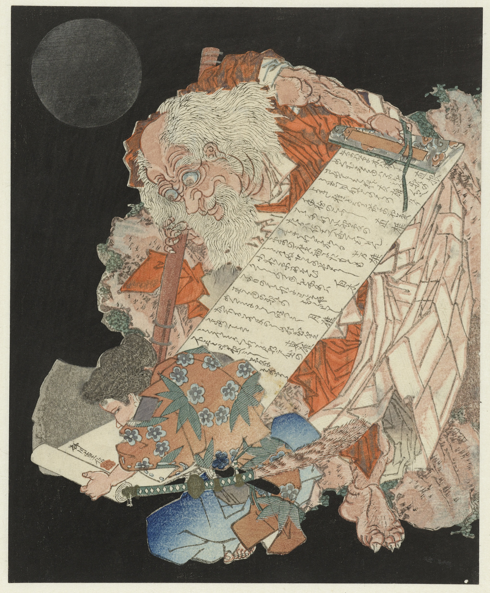 Sôjôbô, de koning van de mythische bergwezens, houdt een rol papier vast. Hij buigt zich over de schrijvende Ushiwakamaru, de kindernaam van de legendarische krijger Minamoto no Yoshitsune (1159-1189). Met zes gedichten op de rol Label Line: mentioned on object Shigenobu (II) , Yanagawa, 1829, kleurenhoutsnede; blinddruk; lijnblok in zwart met kleurblokken; metaalpigmenten Collection: prenten; Japan (collectie)